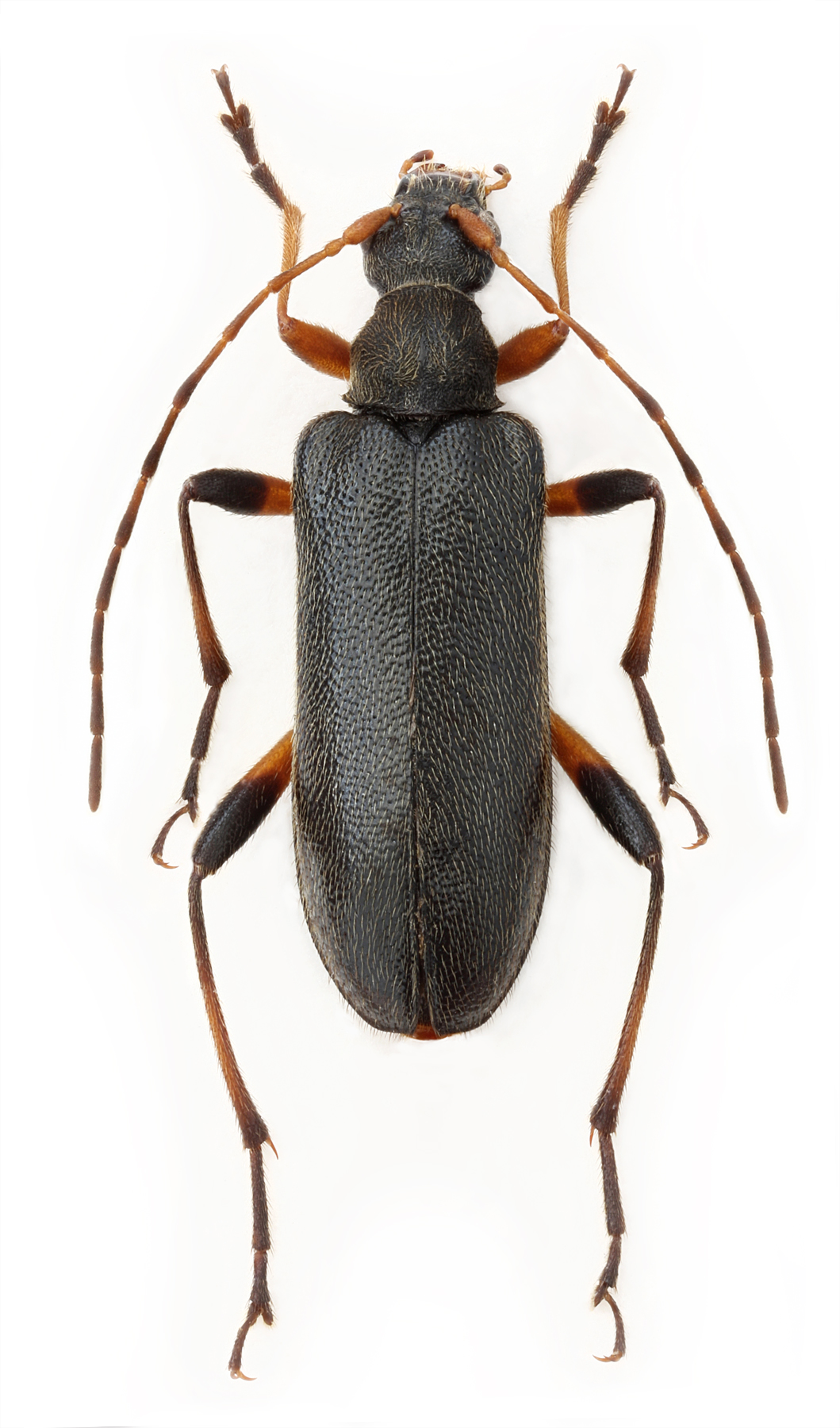 Cortodera femorata